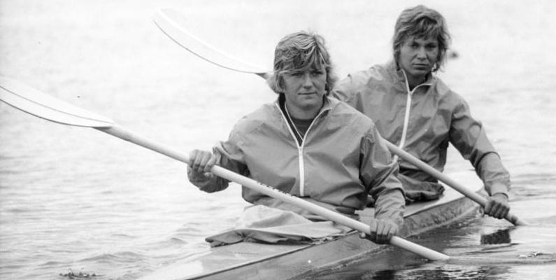 ADN-ZB/Mittelstädt/ 14.7.1976 Montreal: XXI. Olympische Sommerspiele Die Weltmeisterinnen Carola Zirzow und Bärbel Köster (l.) (DDR) auf der Trainingsstrecke der Insel Notre Dame. Auf der 2.188 m. langen Regattastrecke herrscht derzeit Hochbetrieb, da sich Kanuten und Ruderer das künstlich angelegte Becken teilen müssen. 900 Ruderer aus 32 Ländern und 350 Kanuten aus 28 Staaten werden in den Wettkämpfen an den Start gehen.